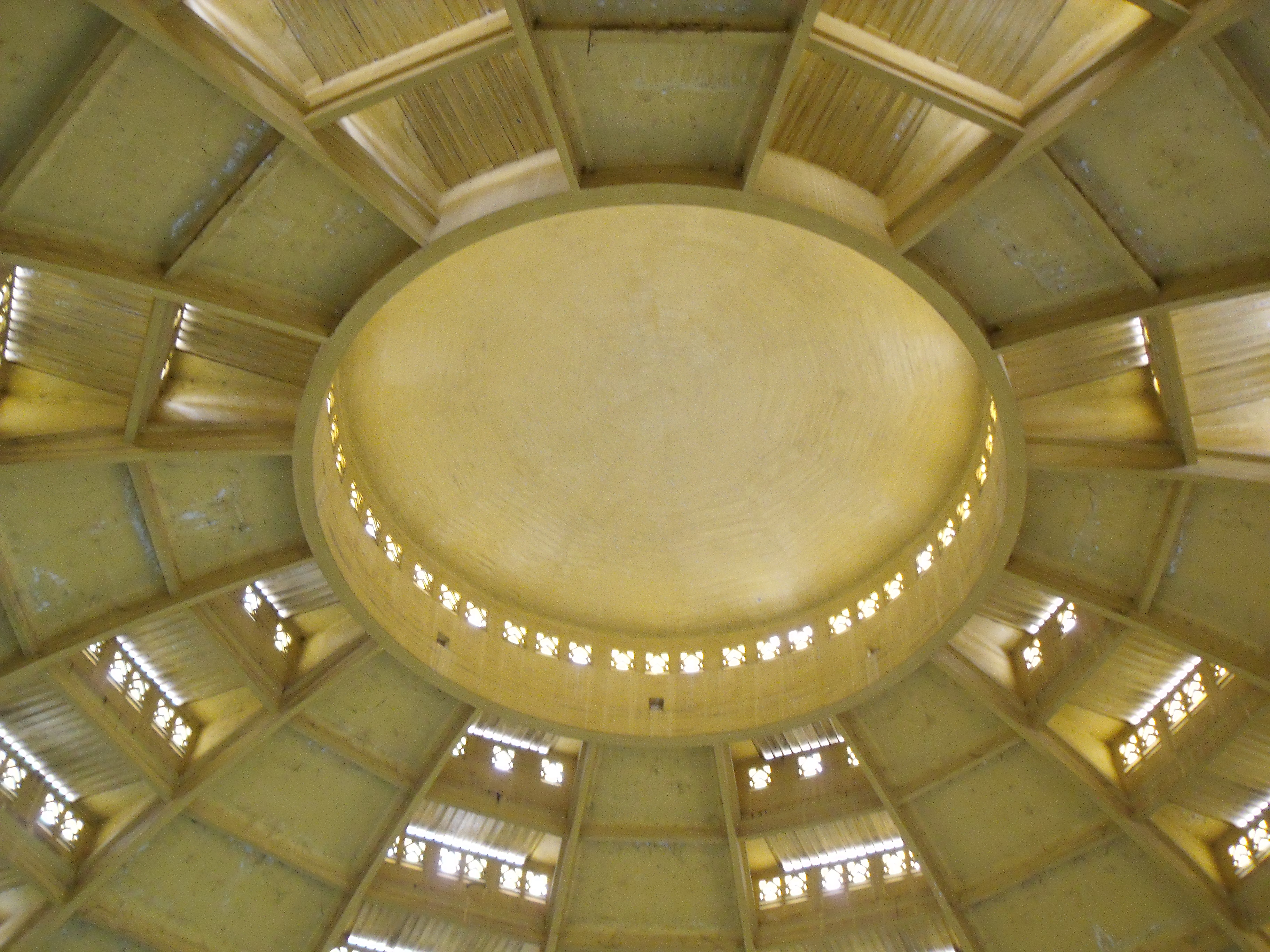 Dôme du Marché Central de Phnom Penh (Phsar Thmei) vu de dessous.